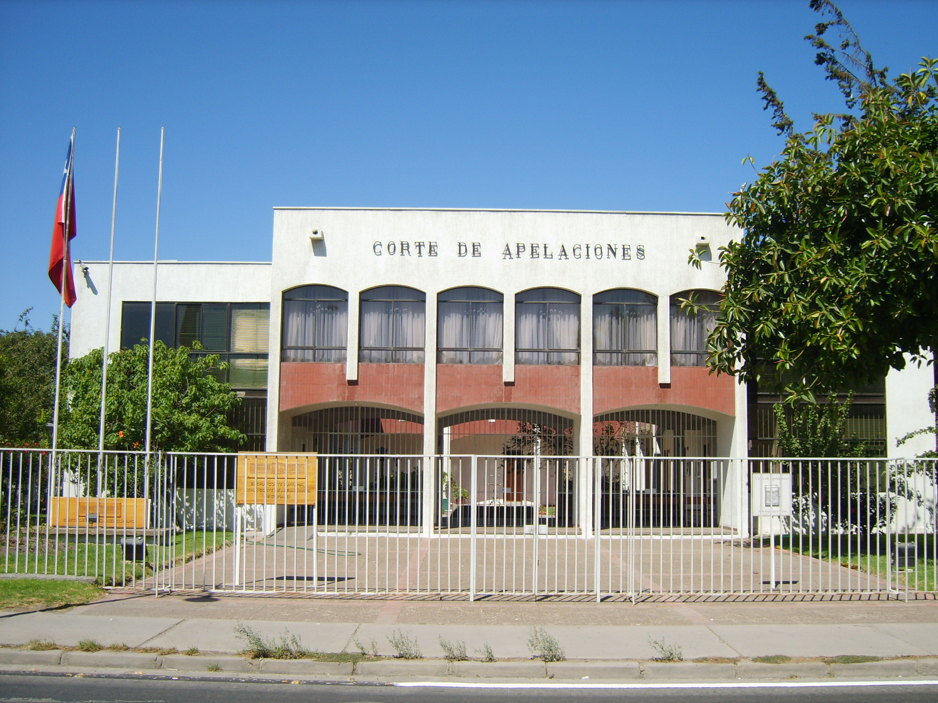 Corte de Apelaciones de Copiapó